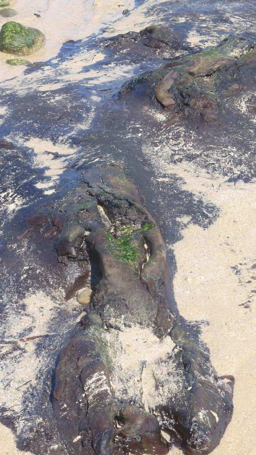 Fósseis na Floresta fóssil de Ponços